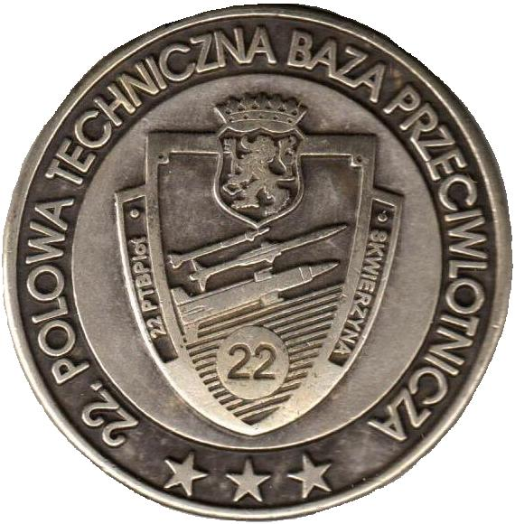 Medal pamiątkowy z okazji 30. rocznicy powstania 22 Polowej Technicznej Bazy Przeciwlotniczej - rewers